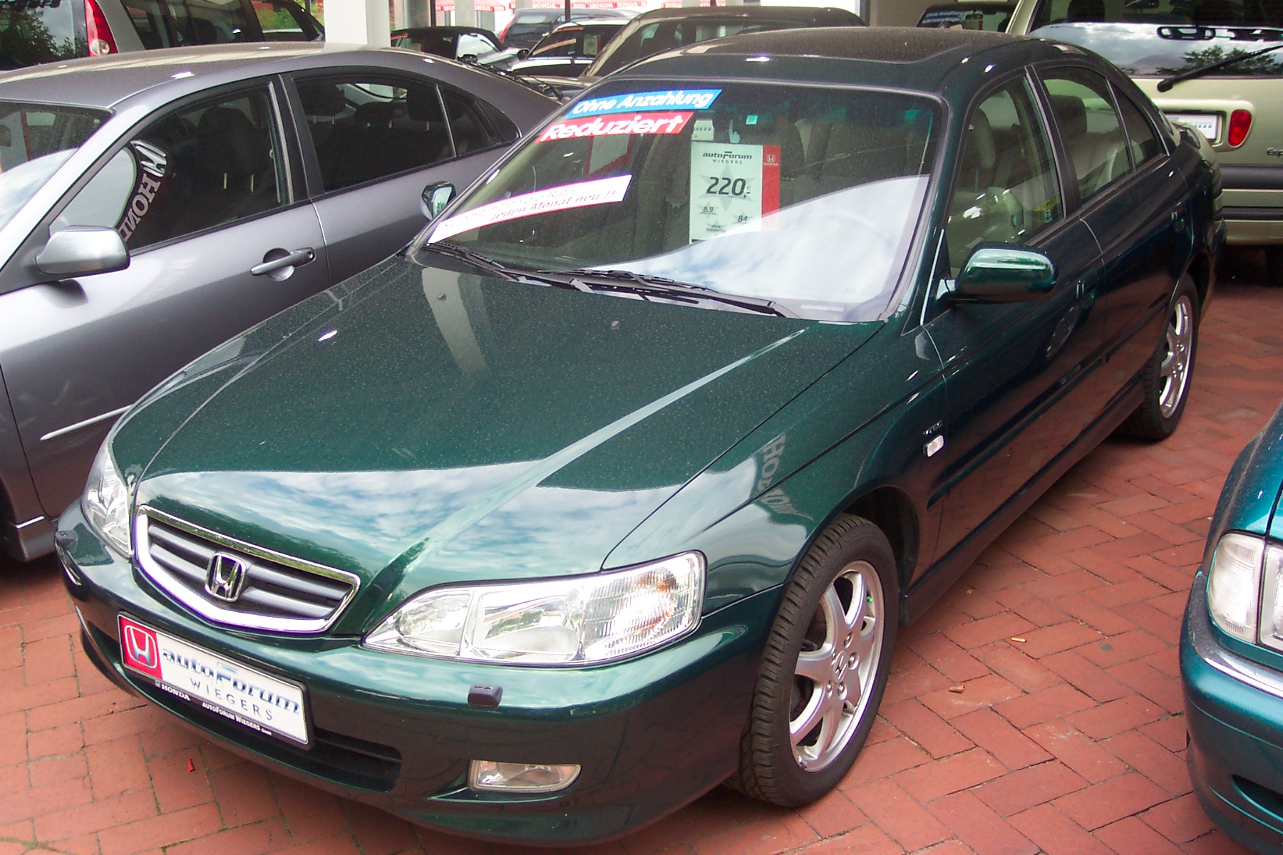 Honda Accord 2.3i (2001-2002 Typ CG8/9)